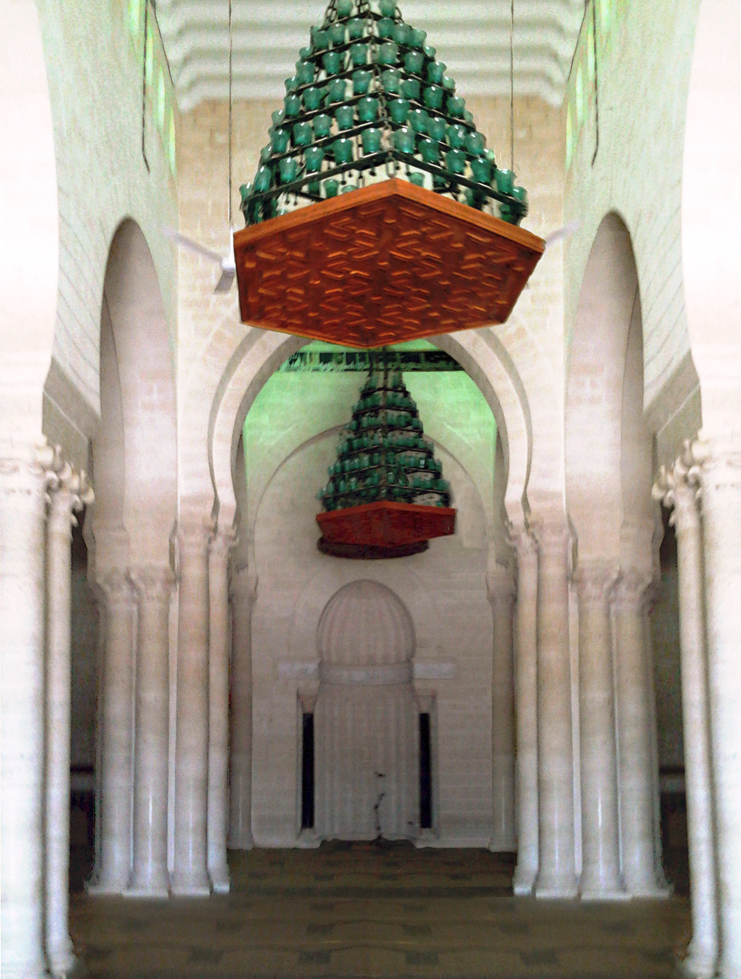 Le grand mosquée de Mahdia (mosquée Fatimide)